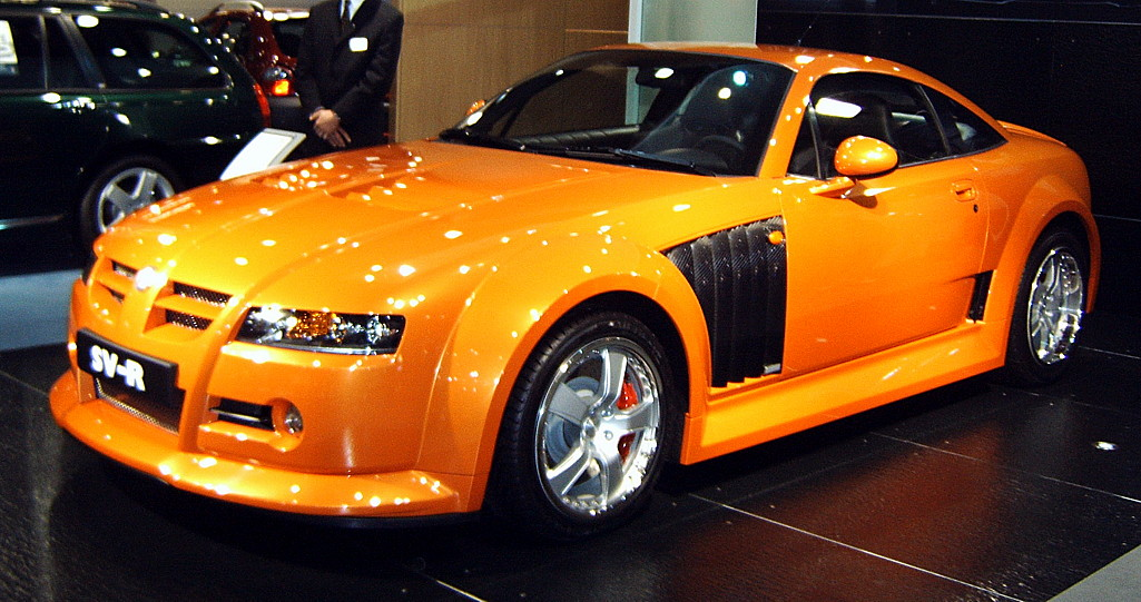 MG SV-R auf der AMI 2005. Selbst fotografiert.